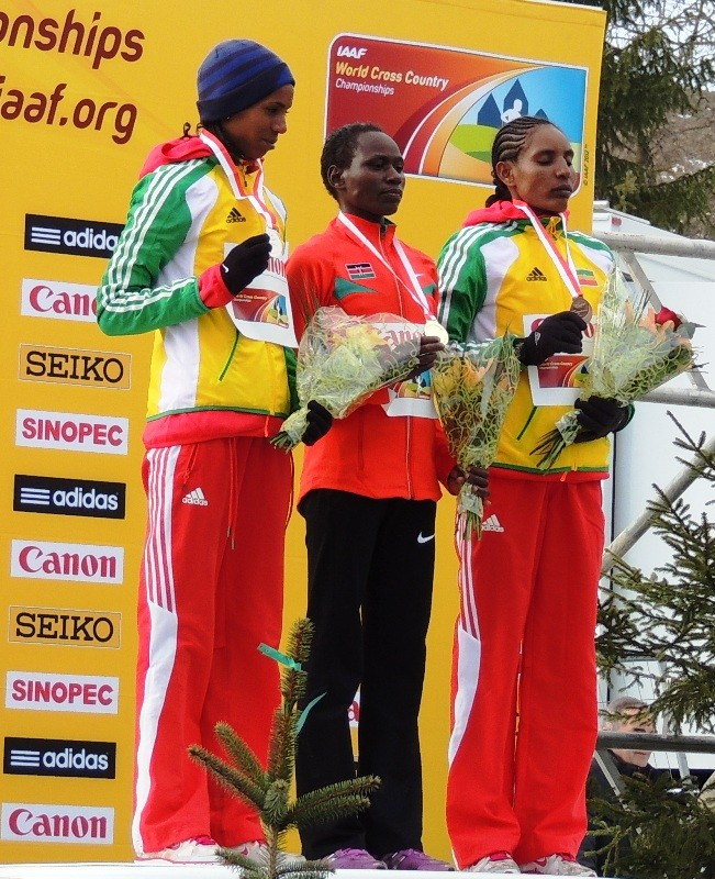 Medalistki biegu seniorek podczas 40. IAAF Mistrzostwa Świata w Biegach Przełajowych Bydgoszcz 2013